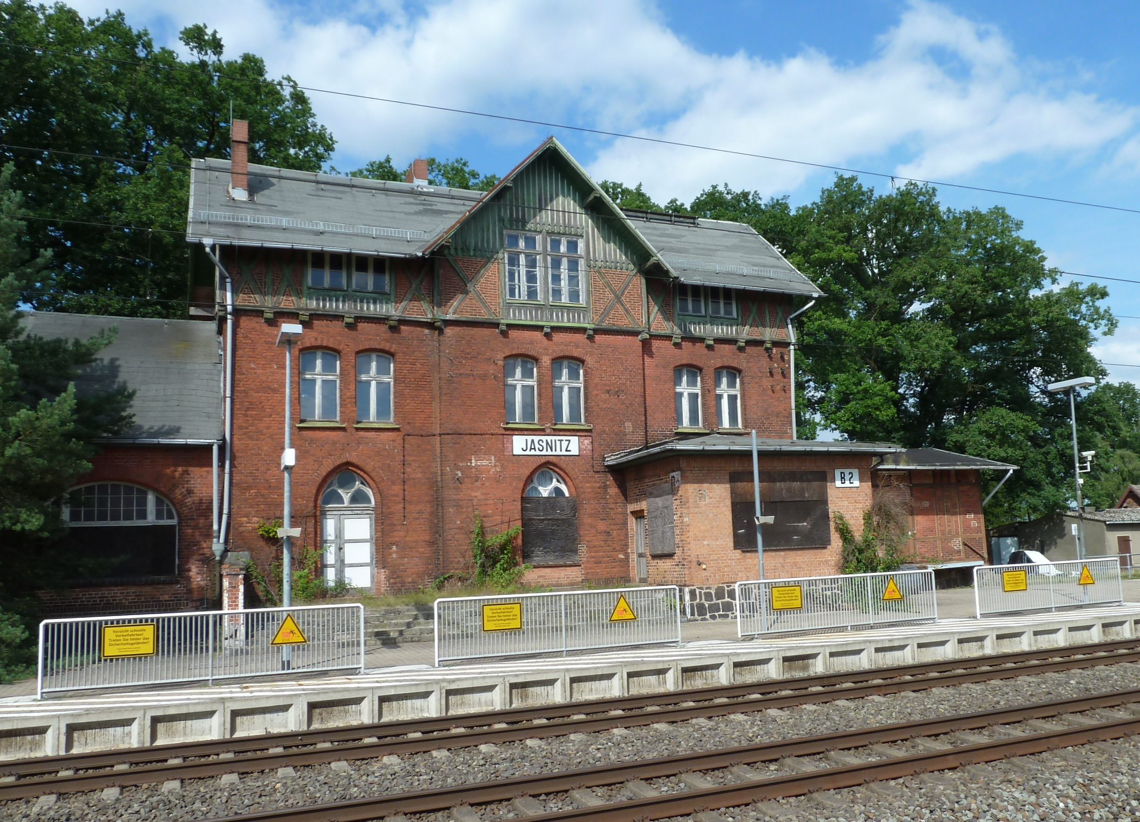 Bahnhof Jasnitz (2012), Empfangsgebäude, Gleisseite